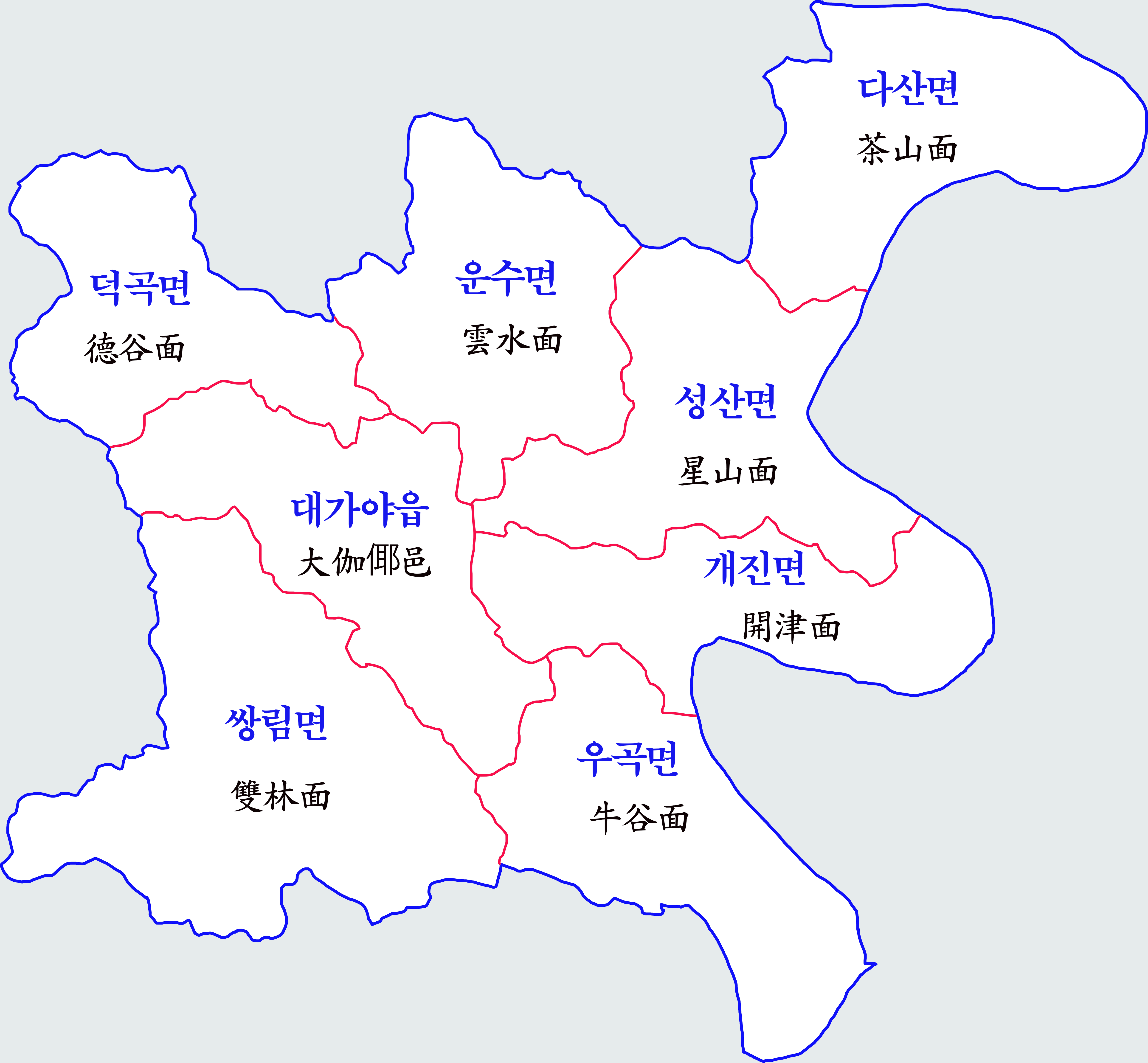 고령군 행정지도